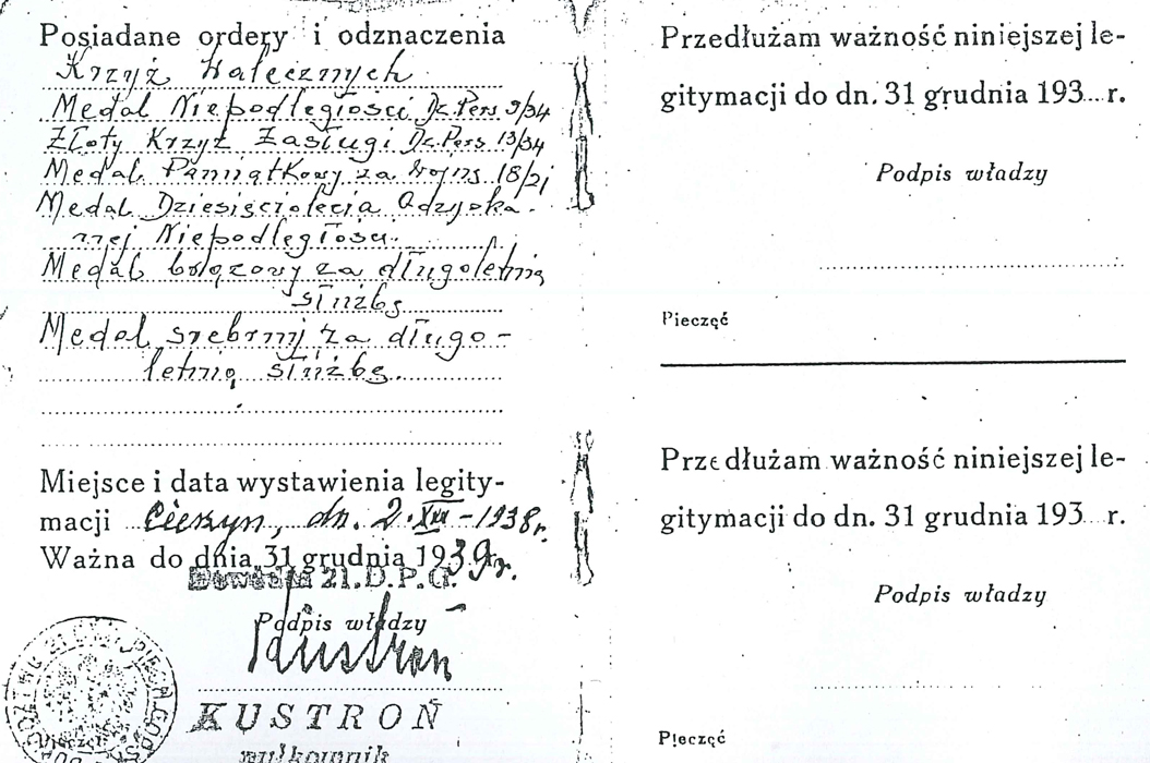 Legitymacja osobista dowódcy 3 pspodh. str. 3